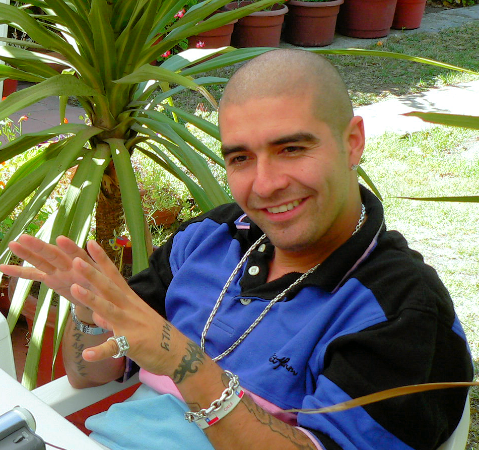 Dj Méndez en enero de 2006 Dj Méndez en la celebración del segundo aniversario de su Fan club, Santiago de Chile, enero de 2006 (clip de imagen mayor, también del autor).